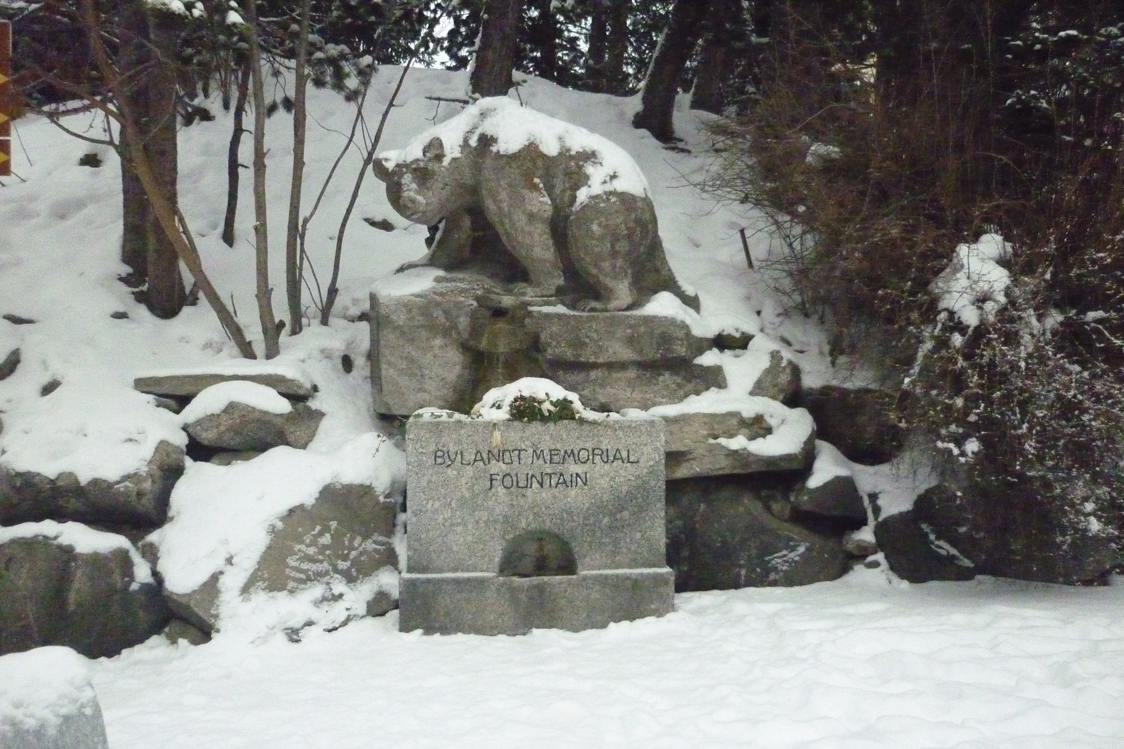 Bylandt Memorial in St moritz